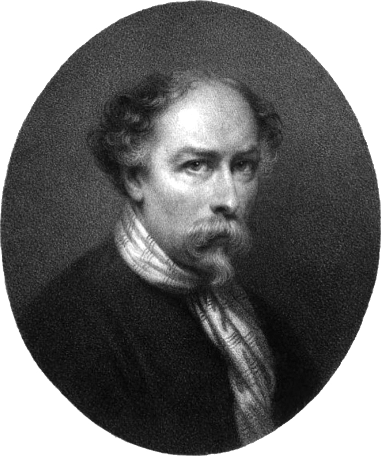 Self-portrait